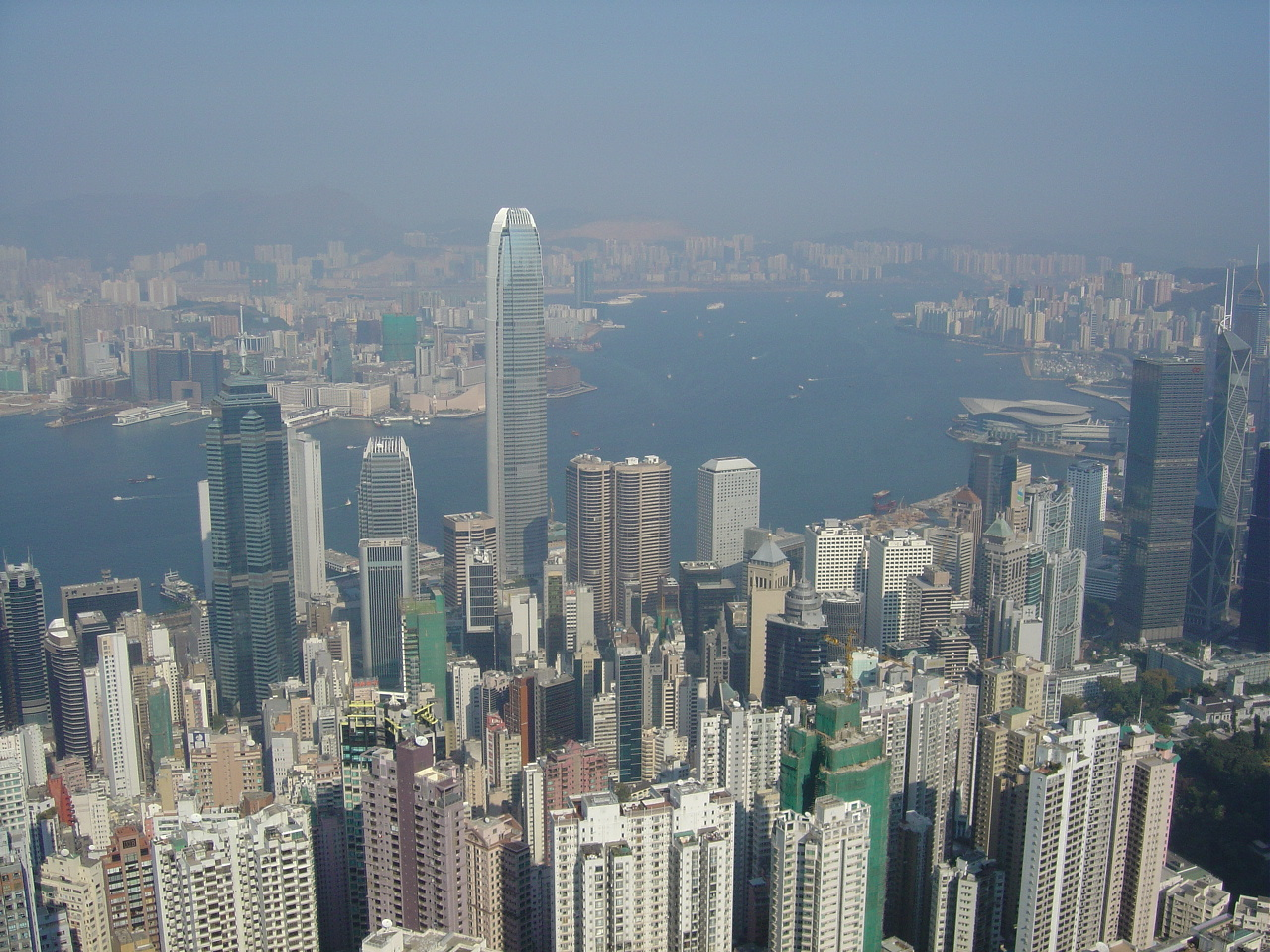 Vue de Hong Kong depuis le Victoria Peak.